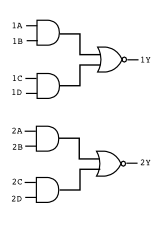 Schéma logique du 7451 et 74s51